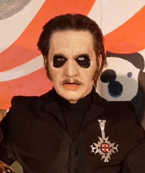 Cardinal Copia tijdens een signeersessie in Concerto, Amsterdam